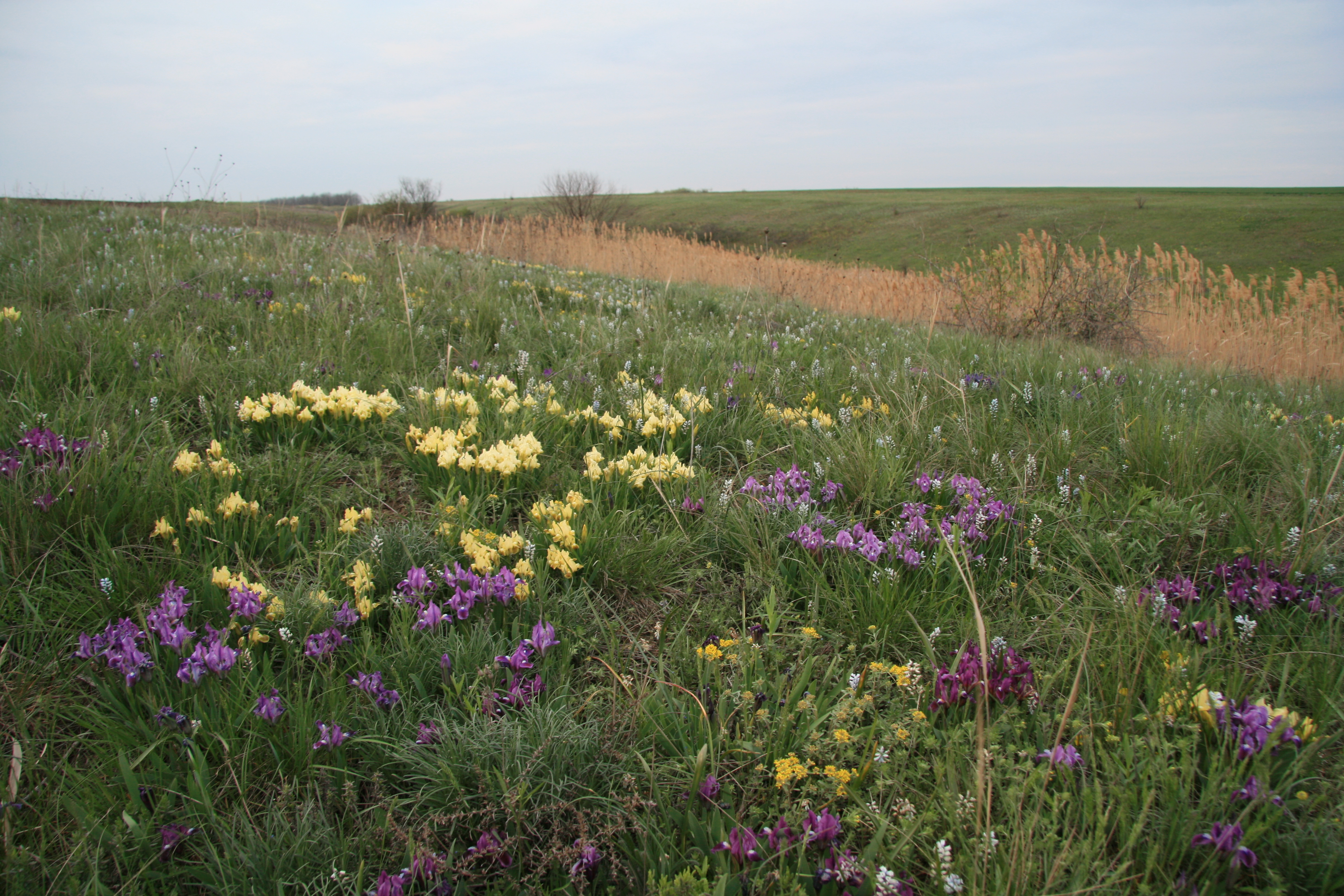 «Тилігульський», Березанський район